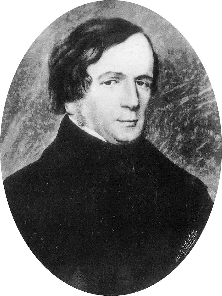 scrittore e deputato Vincenzo Gioberti.